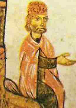 Miniatura del zar Simeón el Grande en el Madrid Skylitzes